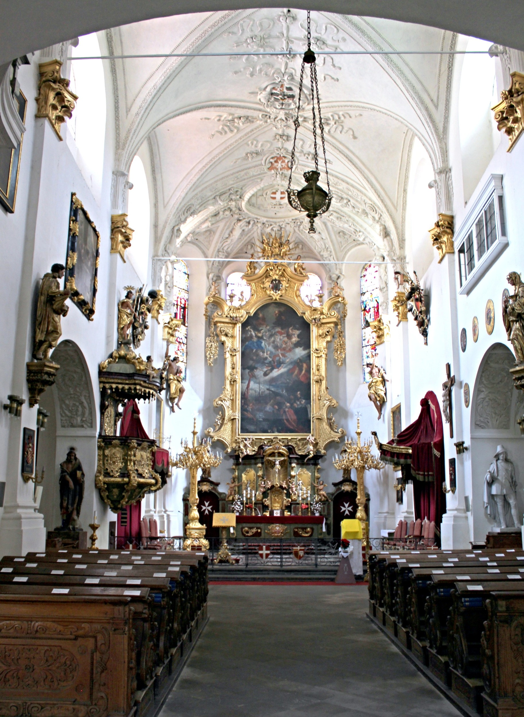 Praha 1-Malá Strana, kostel Panny Marie pod řetězem